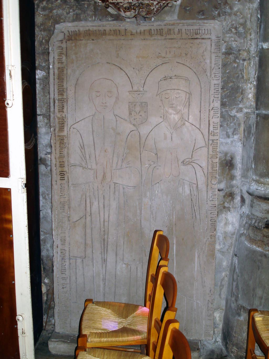 L'église Saint-Pierre-Saint-Paul à Sarcelles (Val-d'Oise), France La pierre tombale de Jehan Soudain Août 2007 Photo personnelle (own work) de Clicsouris